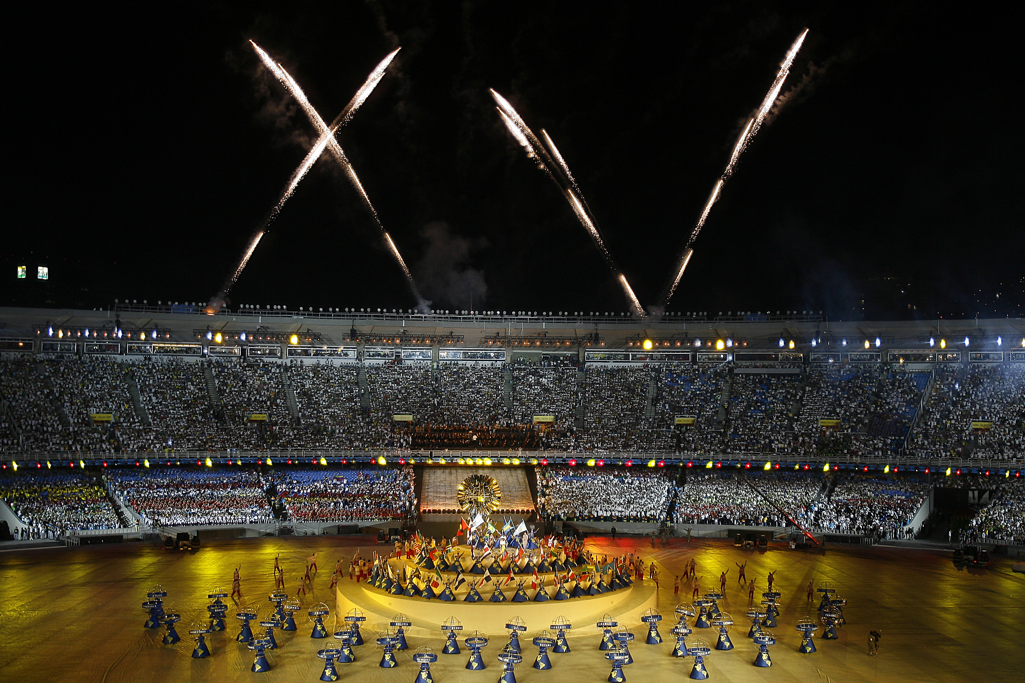 Rio de Janeiro - Cerimônia realizada no Maracanã marca oficialmente a abertura dos Jogos Pan-Americanos Rio-2007 .